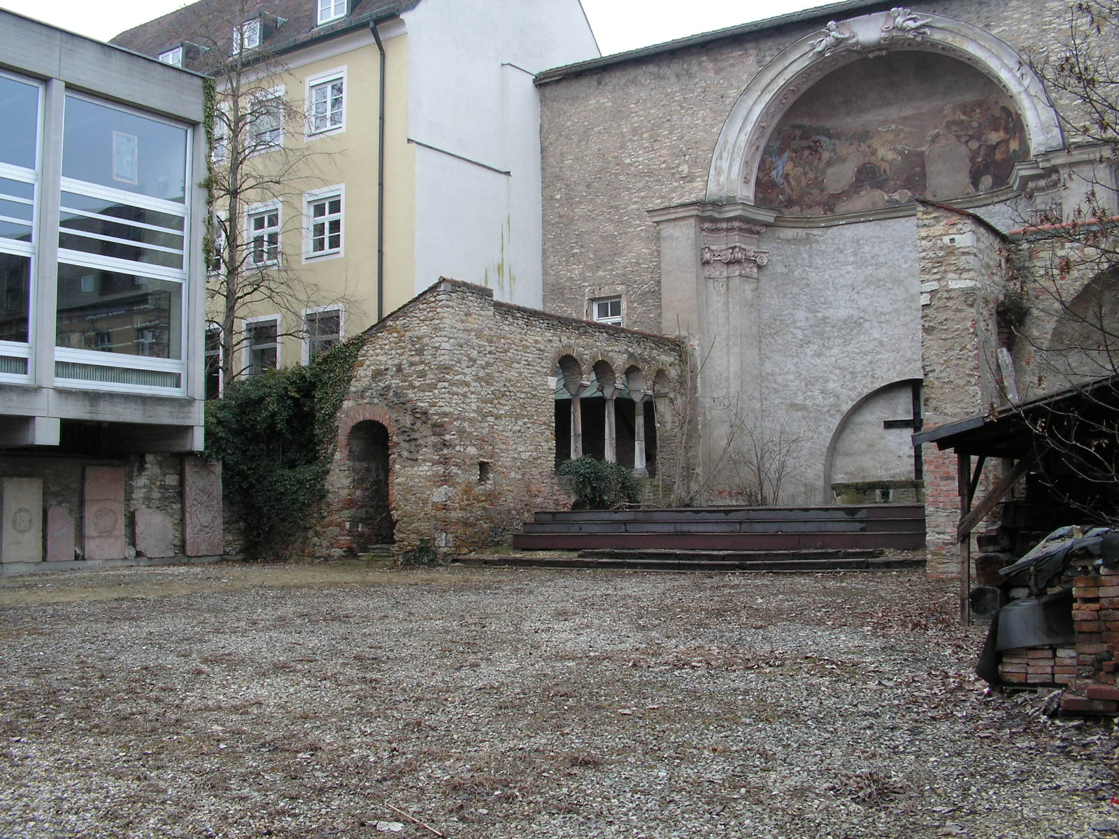 Ruine der am 13. März 1945 bei einem Luftangriff zerstörten Stiftskirche Obermünster in Regensburg.